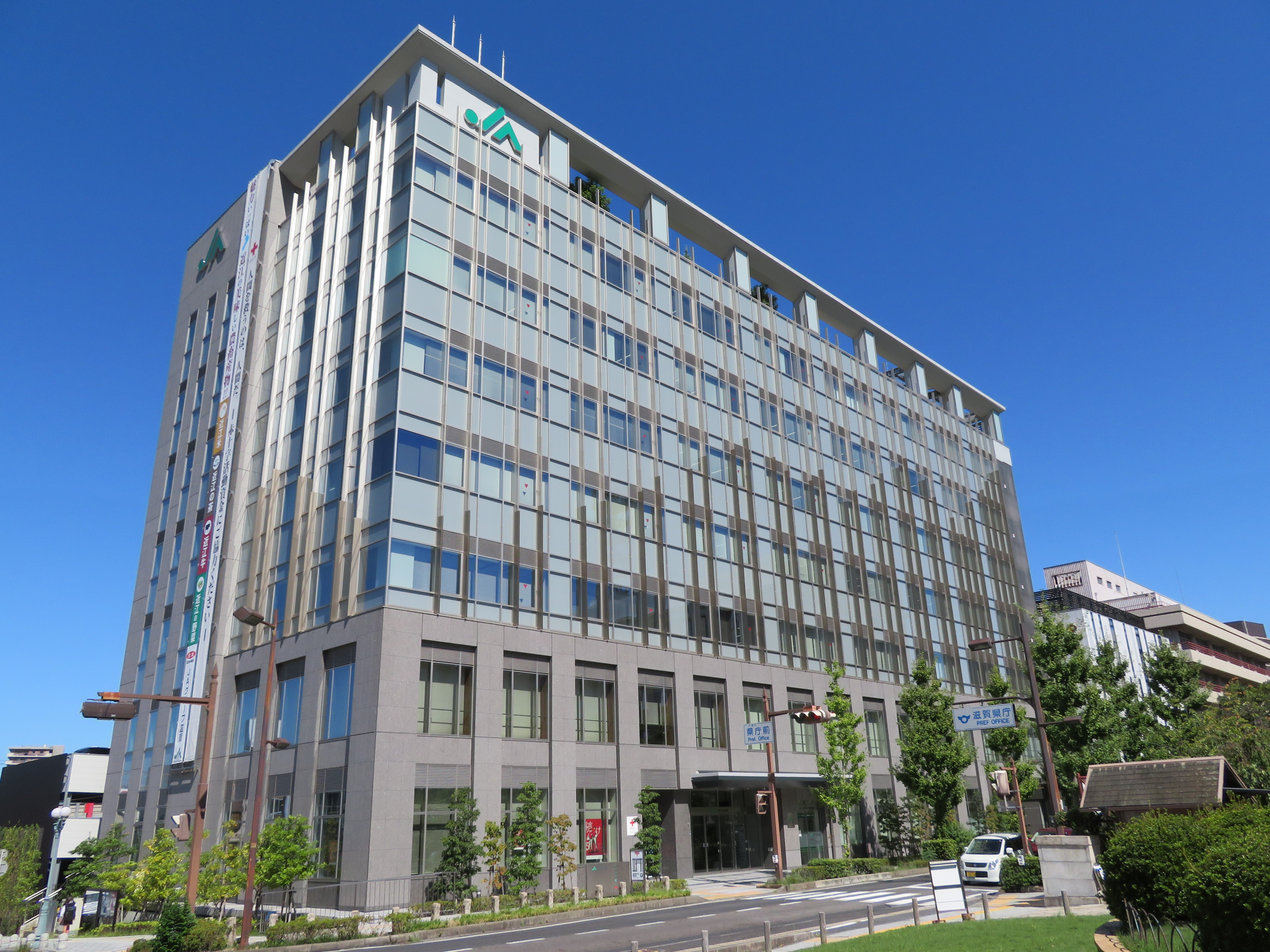 JA滋賀ビル